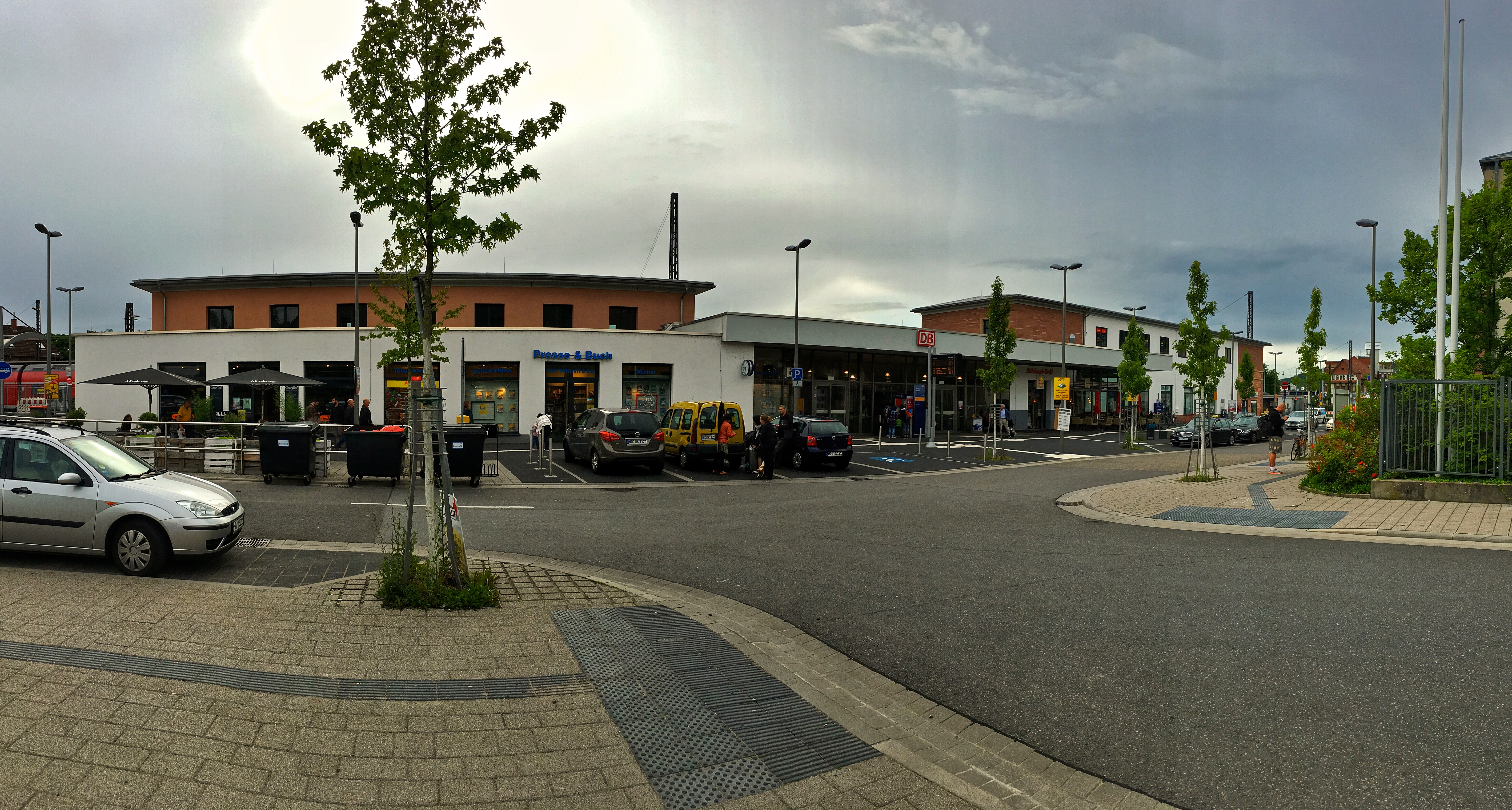 Das Empfangsgebäude des Bahnhofs nach Beendigung der Umbauarbeiten des Vorplatzes